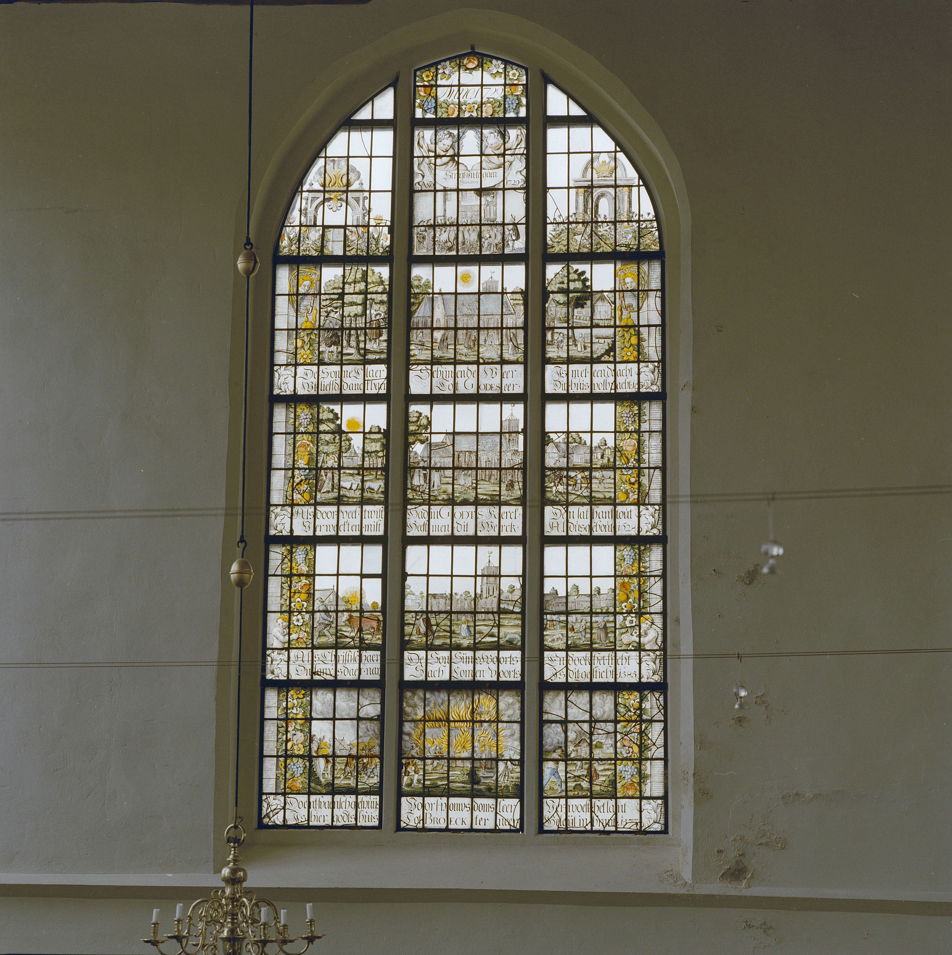 Nederlands Hervormde Kerk: INTERIEUR, GLAS IN LOODRAAM